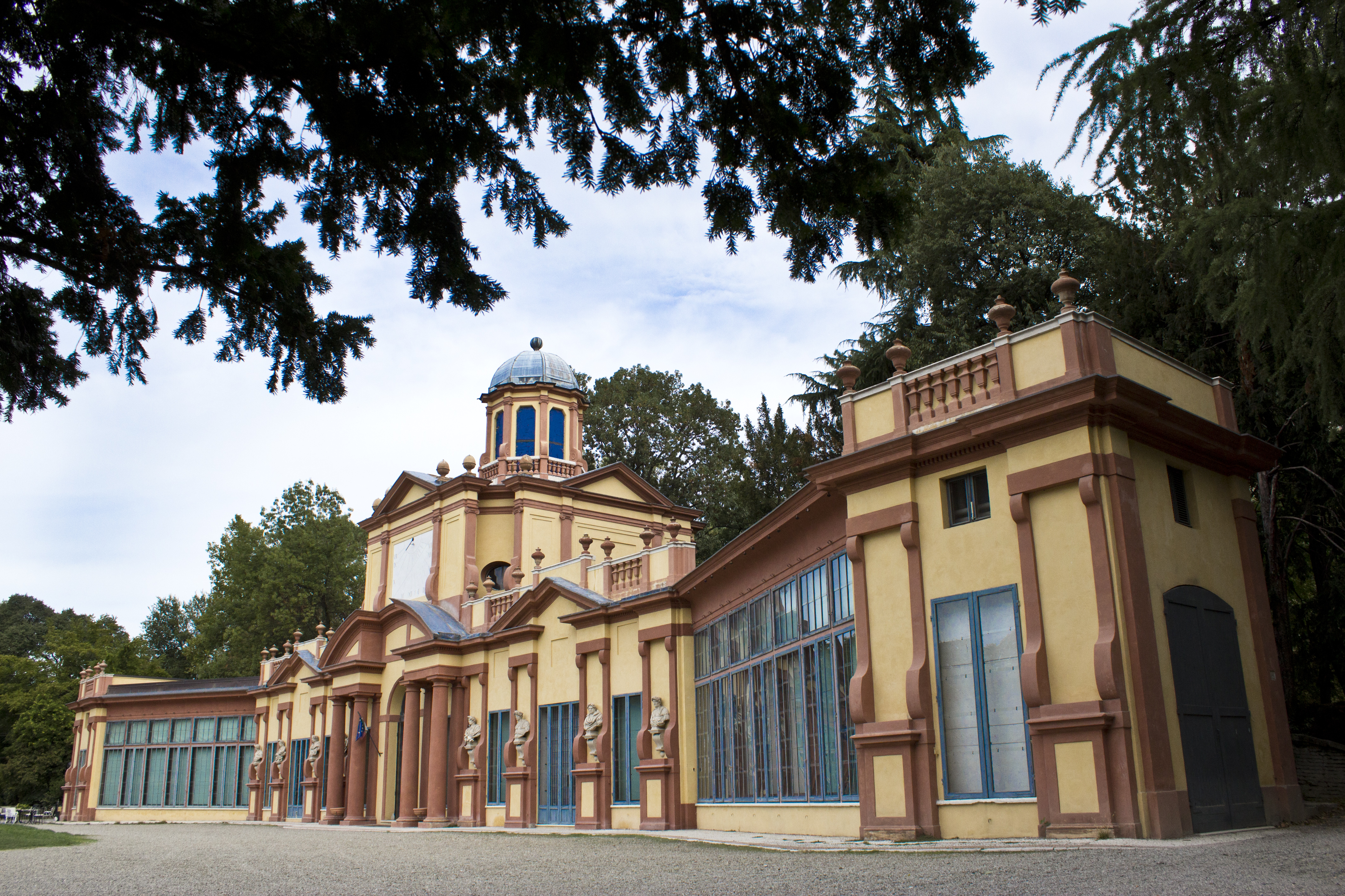 Palazzina Vigarani This is a photo of a monument which is part of cultural heritage of Italy.